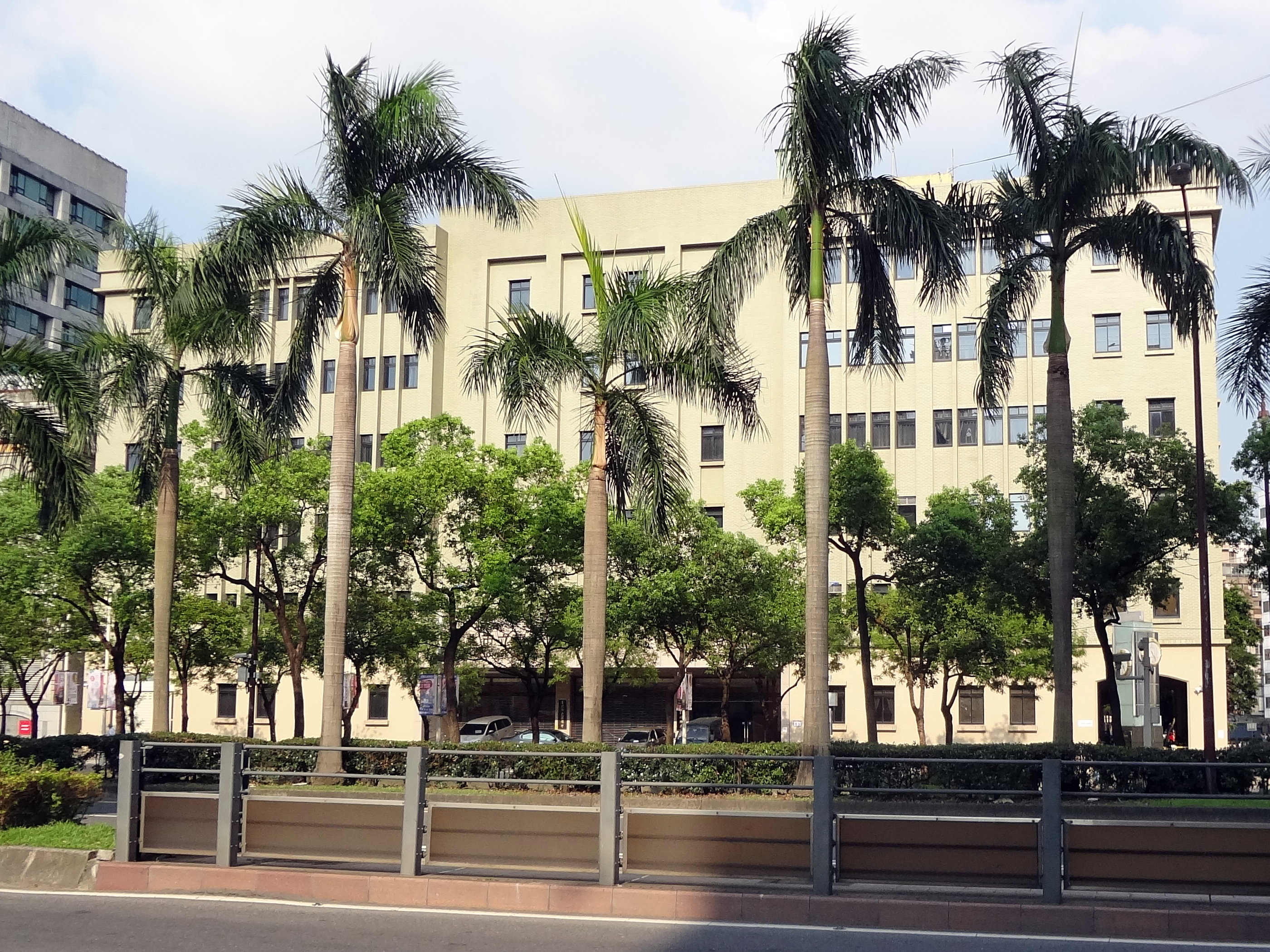 原國民大會秘書處，位於臺北市中正區中華路一段53號，現由臺北市立國樂團與經濟部礦務局合用。